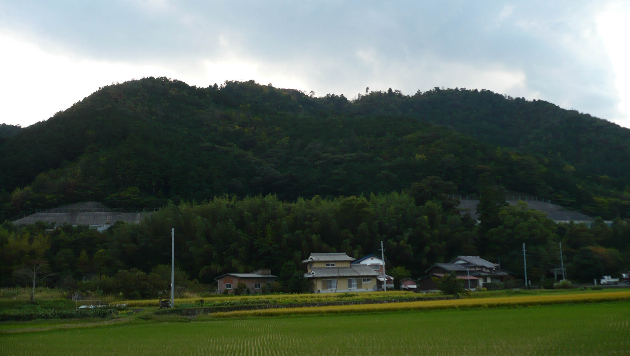 城山